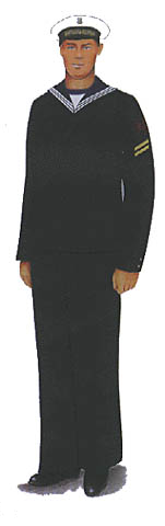 Rysunek ten pochodzi z załącznika do rozporządzenia ministra obrony narodowej z dnia 2 grudnia 2004 r. w sprawie wzorów oraz noszenia umundurowania i oznak wojskowych przez żołnierzy zawodowych i kandydatów na żołnierzy zawodowych.